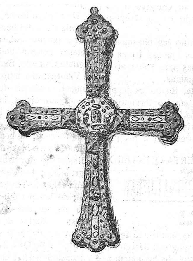 Cruz de la Orden de la Legitimidad Proscrita